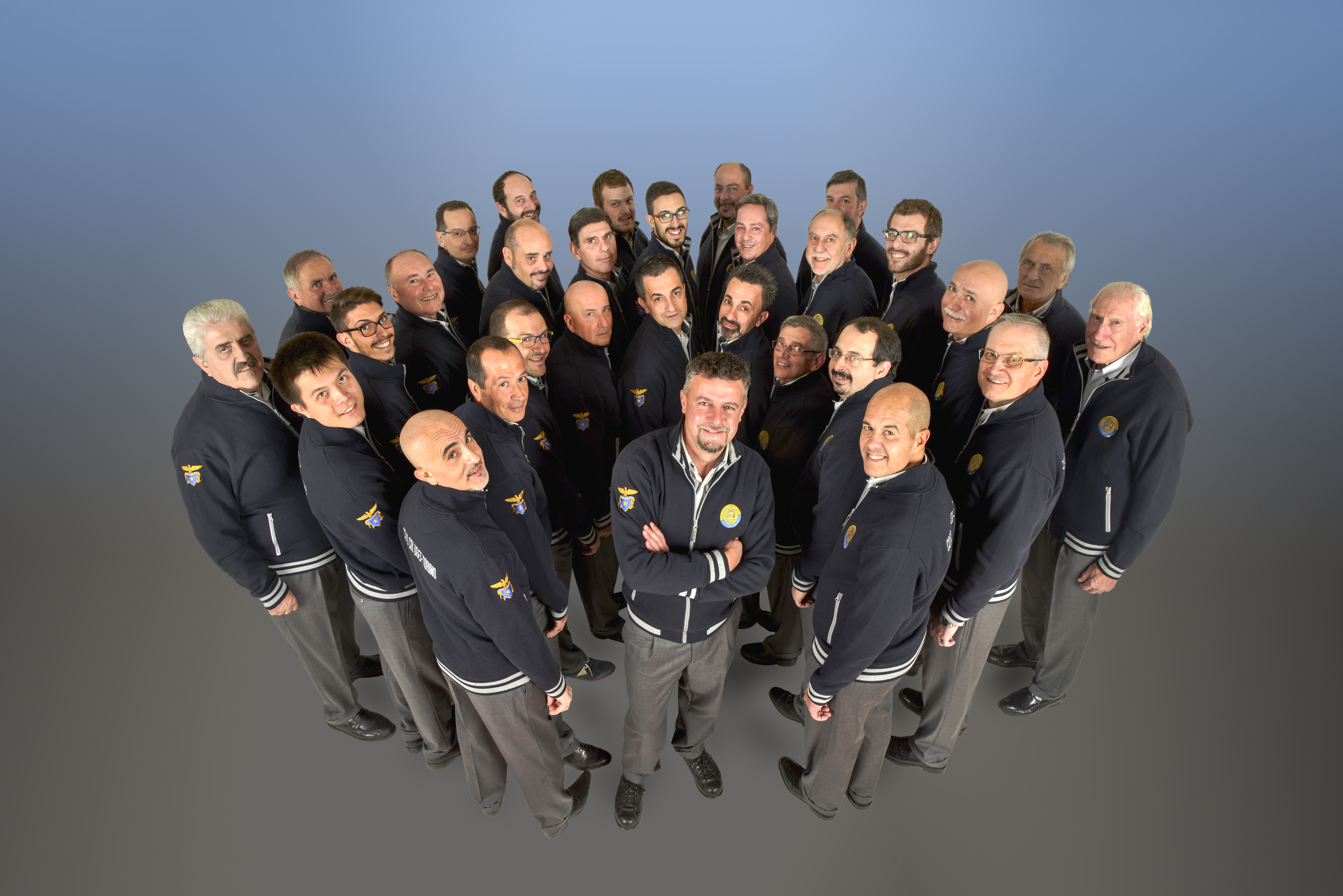 for coro 2016